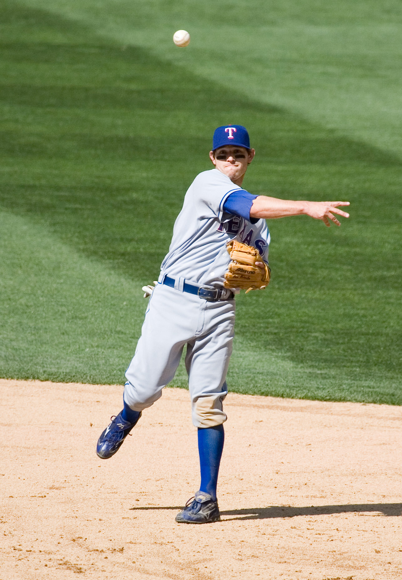 Ian Kinsler